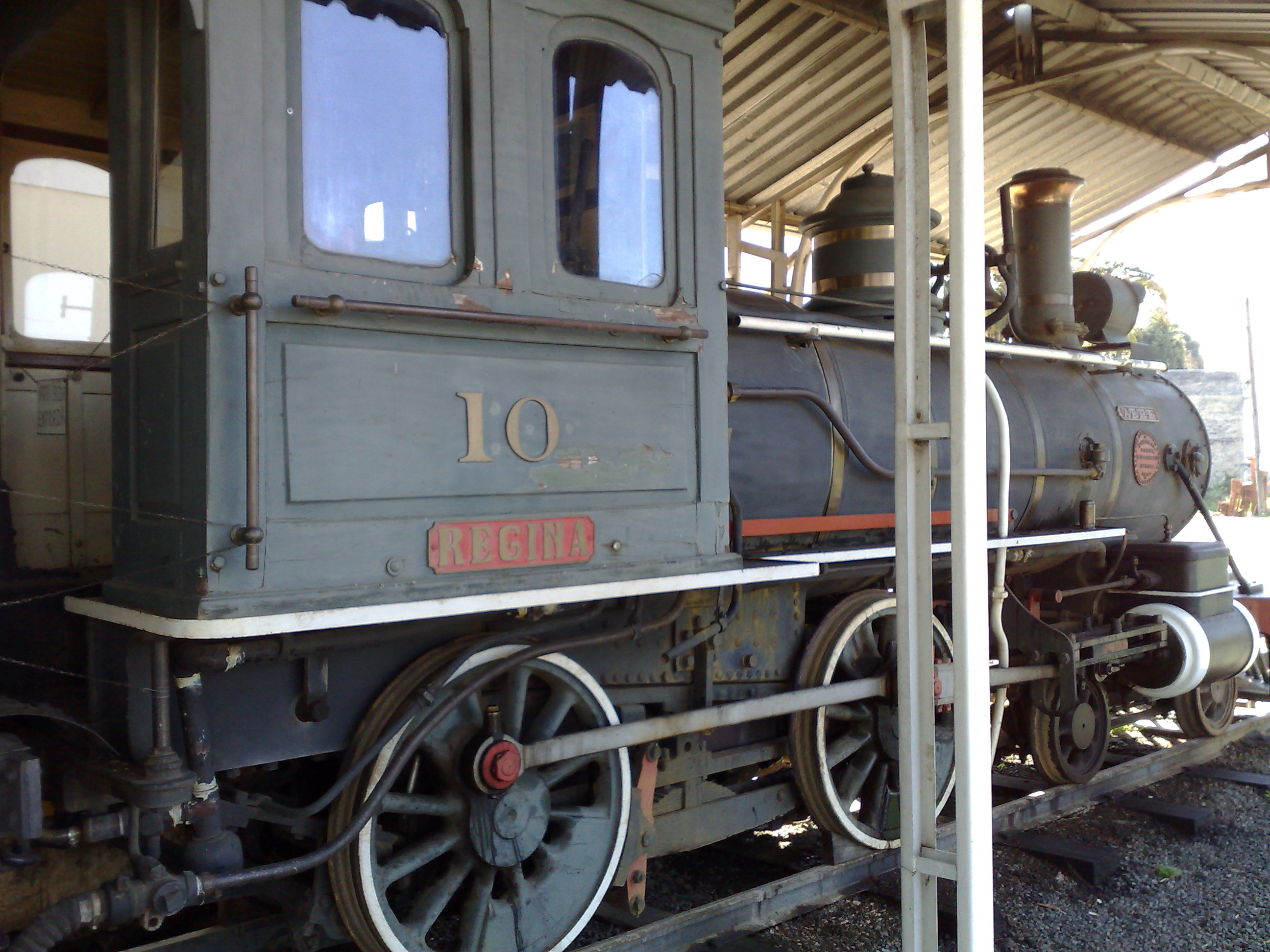 Locomotiva número 1 da Companhia Ytuana estacionada na estação ferroviária de Indaiatuba, atualmente um Museu Ferroviário.